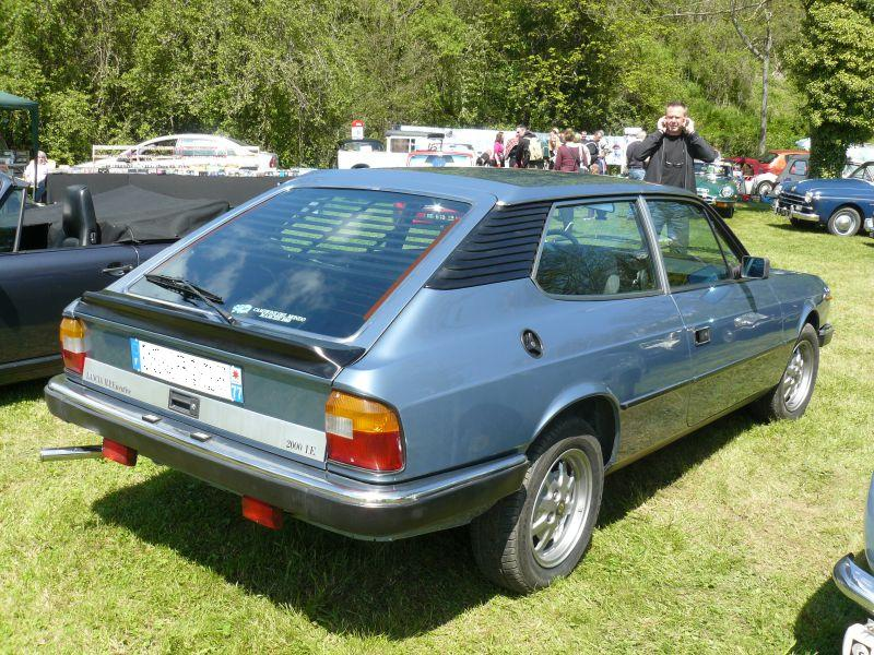 Photo prise le premier mai 2012 à Chelles.